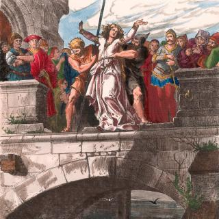 Tod der Agnes Bernauer in Straubing. Kolorierter Holzschnitt um 1880